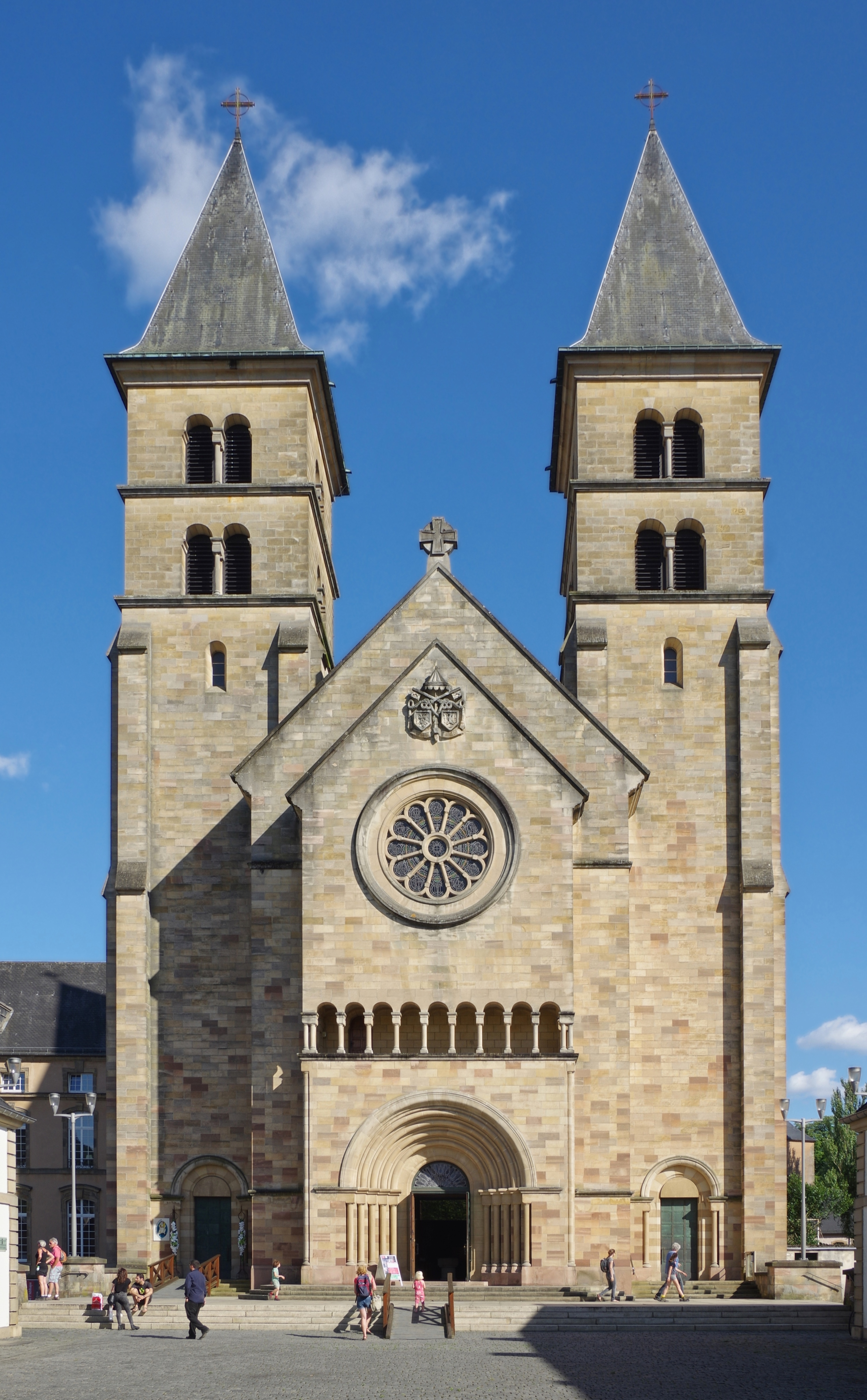 Luxemburg, Echternach, St. Willibrord Basilika